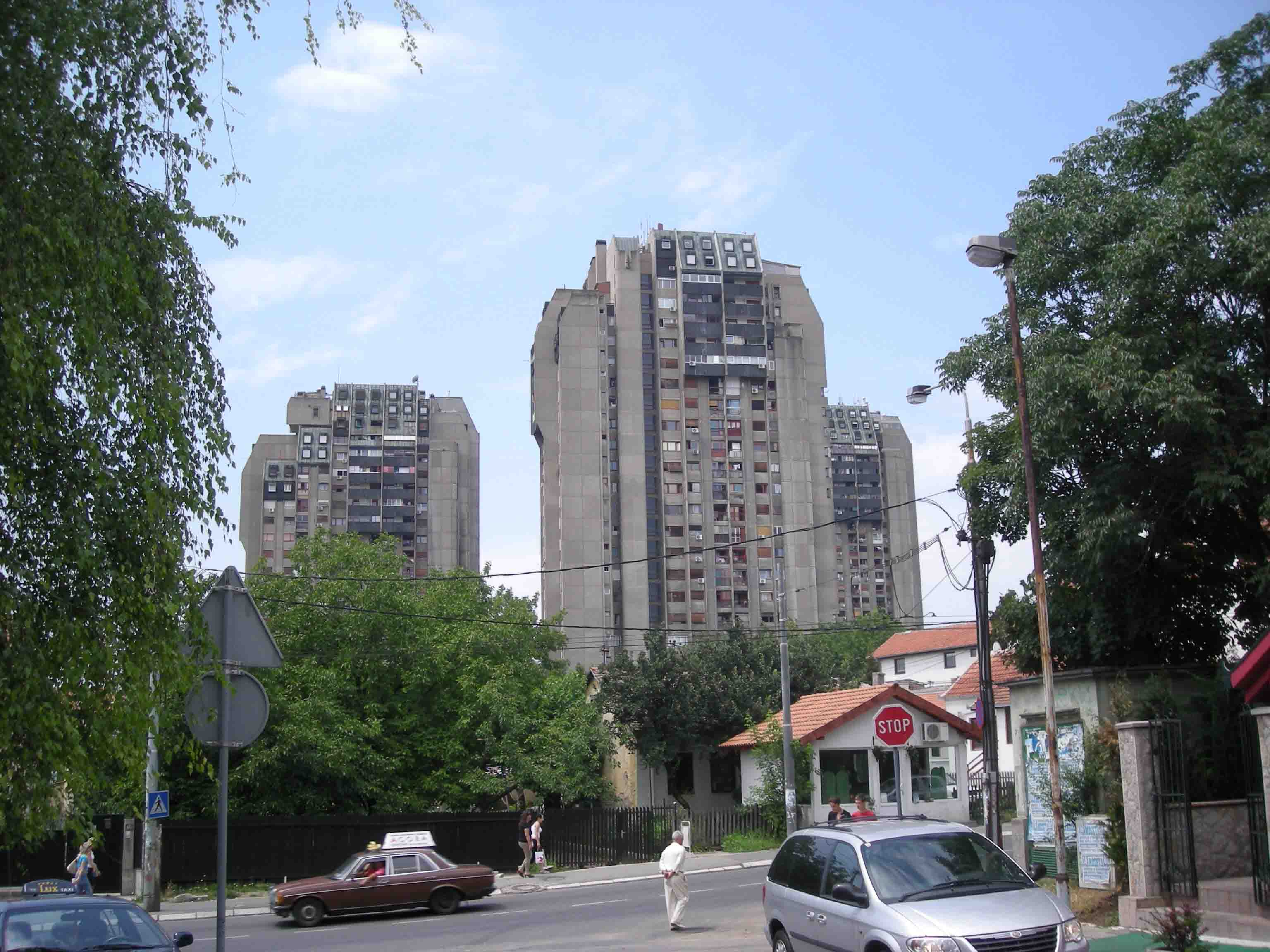 Пет солитера на Бањици